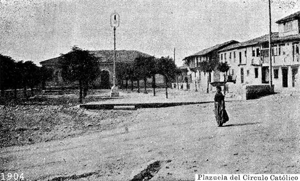 Plazuela del Circulo Católico en el concejo de Noreña